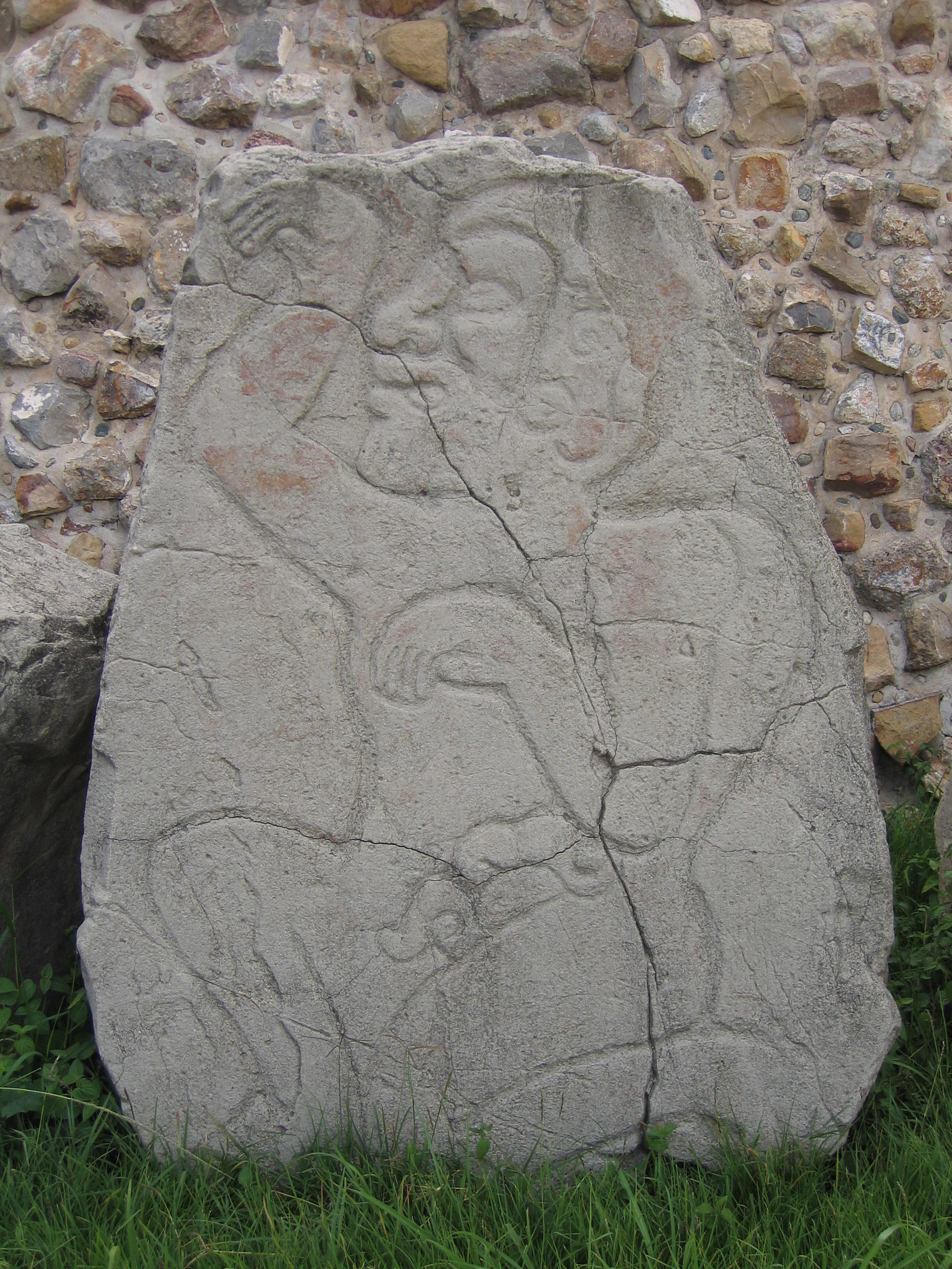 Monte Alban (Oaxaca Mexico), medical stone, August 2006